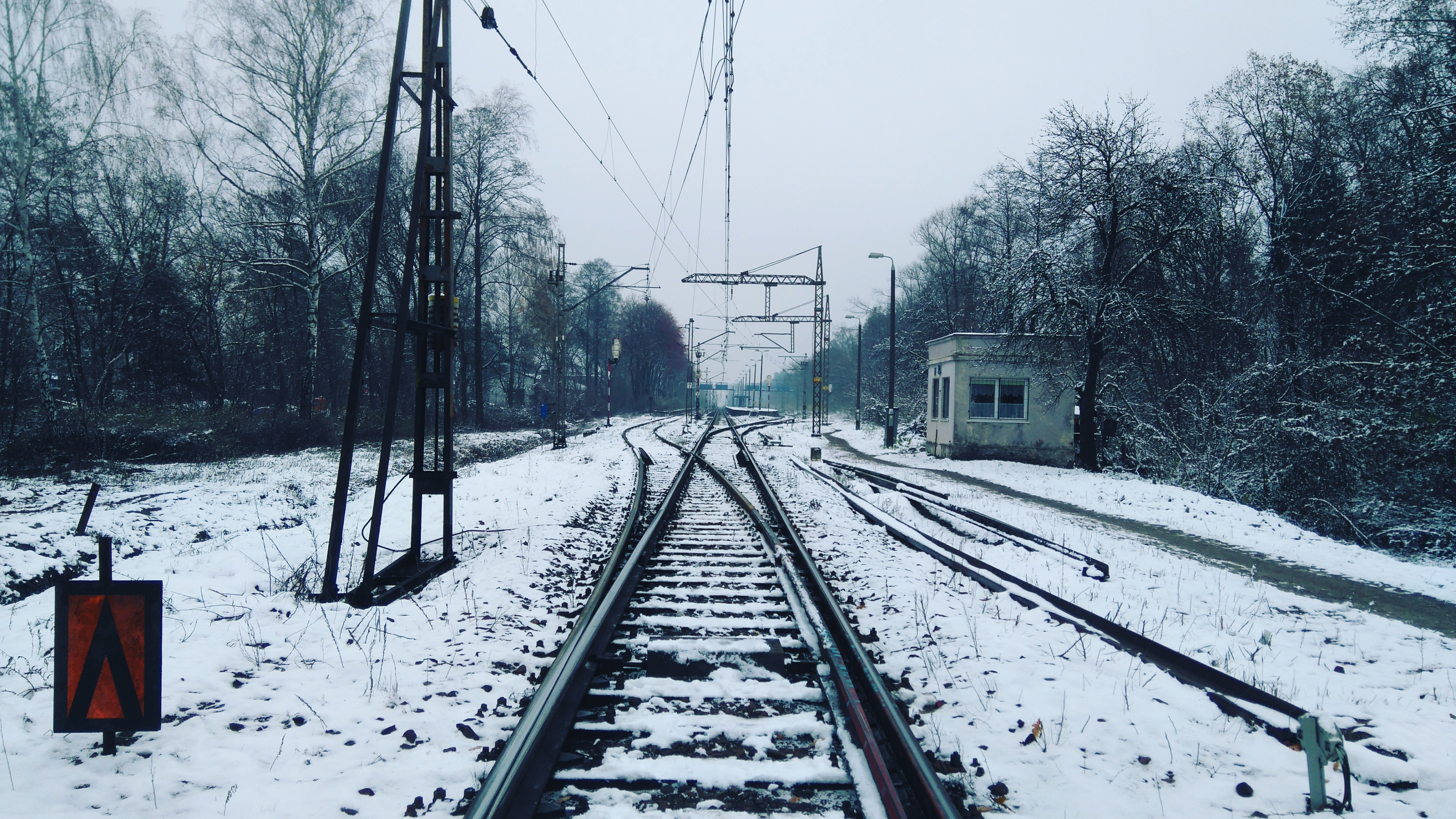 Wjazd na stację Celestynów. Widok z przejazdu przy ul. Jankowskiego.